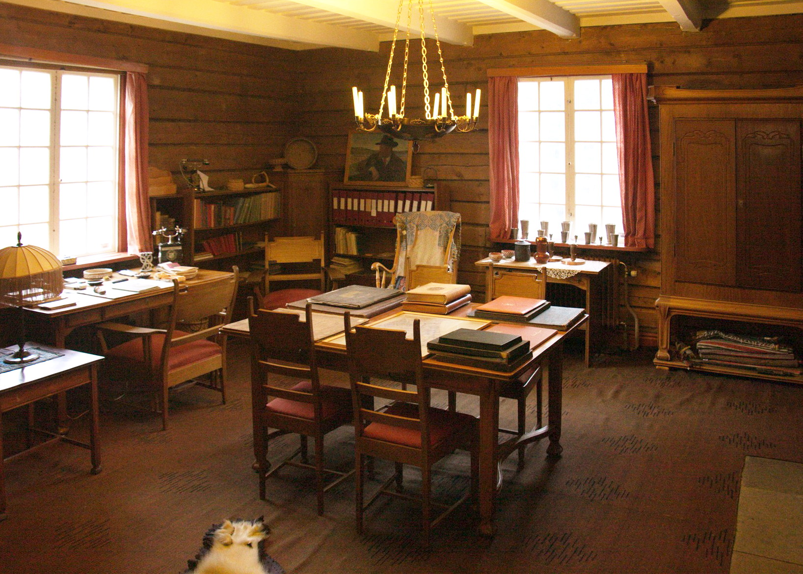 Despatx de Hjalmar Lundbohms, conservat a la seva casa, Hjalmar Lundbohmsgården, a Kiruna